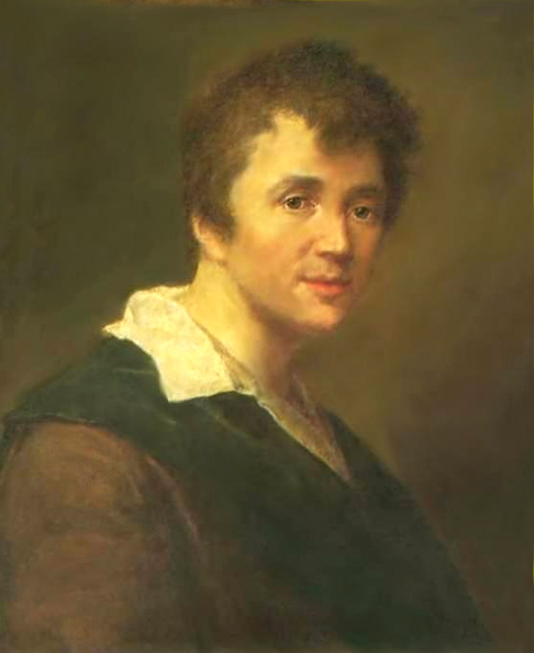 Автопортрет С. С. Щукина